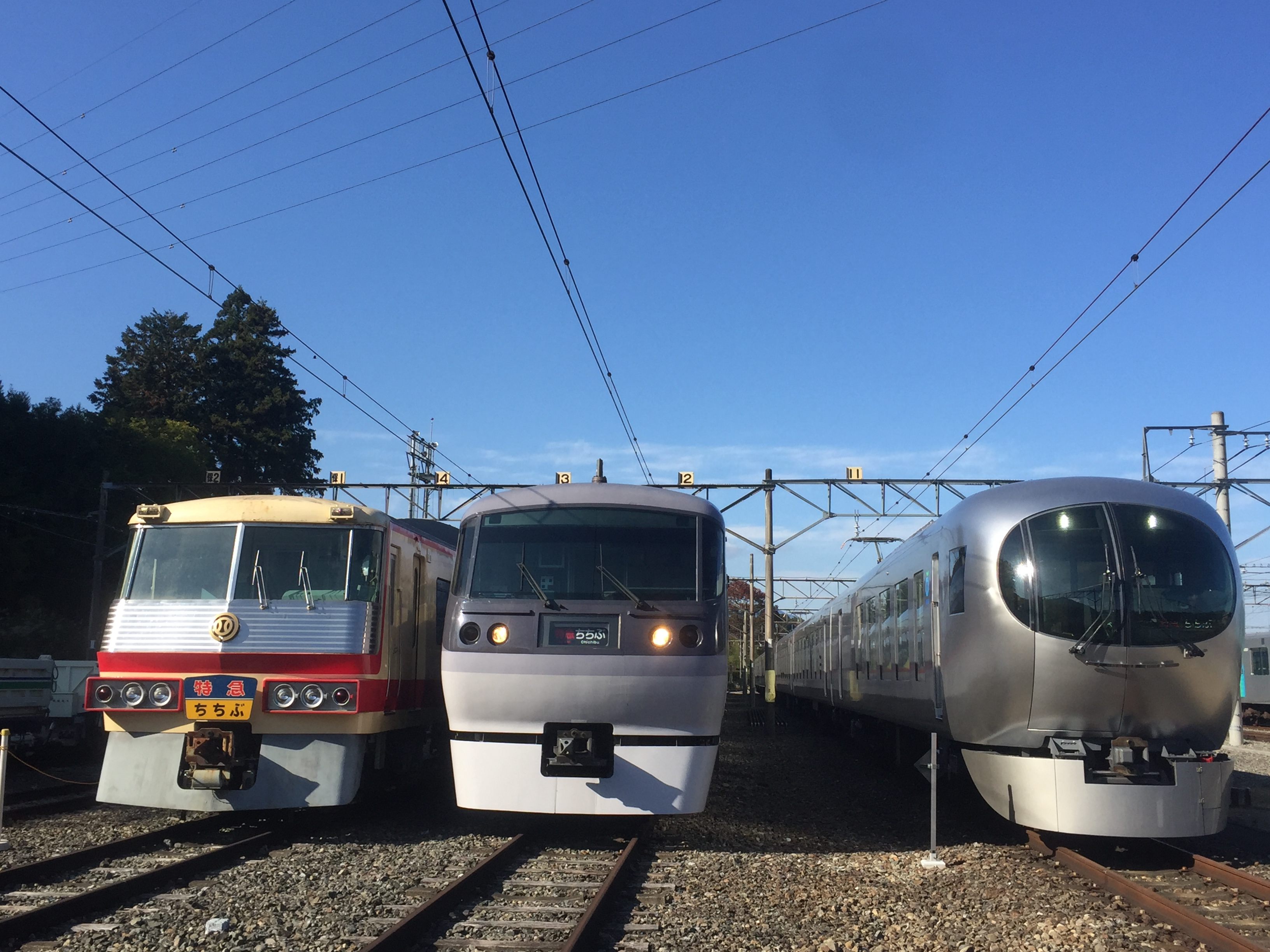 5000系、10000系、001系の並び。2019年横瀬公開で撮影。